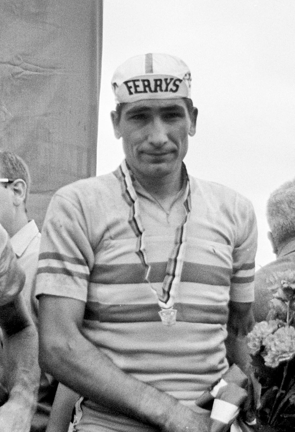 WK Wielrennen te Heerlen finish profs. Ramón Sáez Marzo